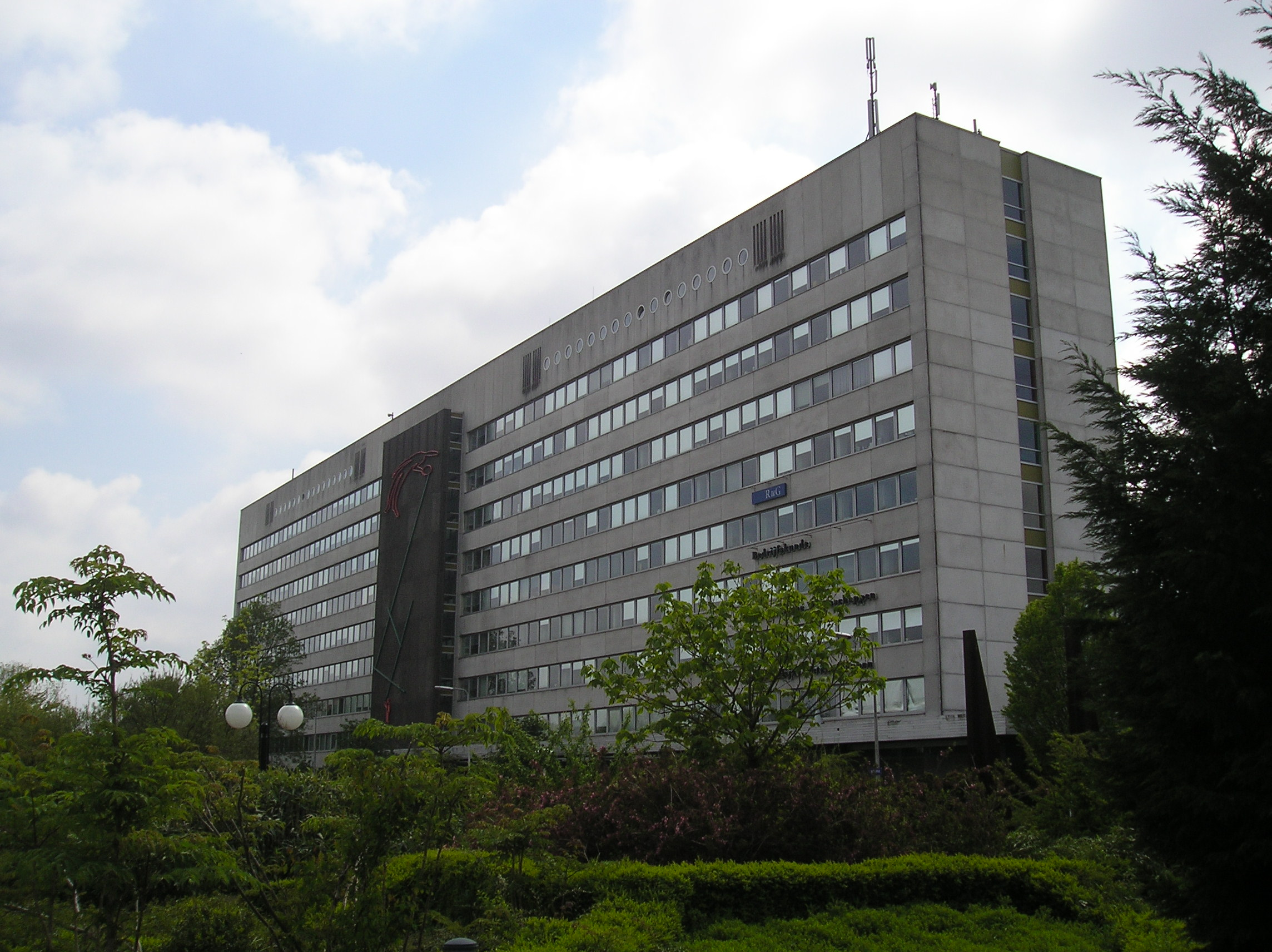 Gebouw van de Faculteit Bedrijskunde, Faculteit der Economische Wetenschappen en Faculteit der Ruimtelijke Wetenschappen